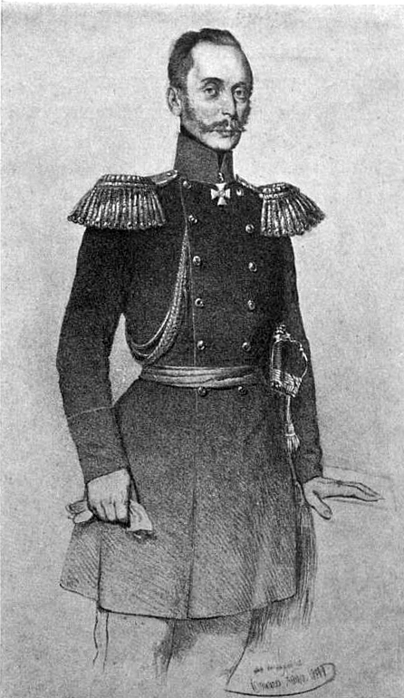 Генерал-адъютант Павел Христофорович Граббе